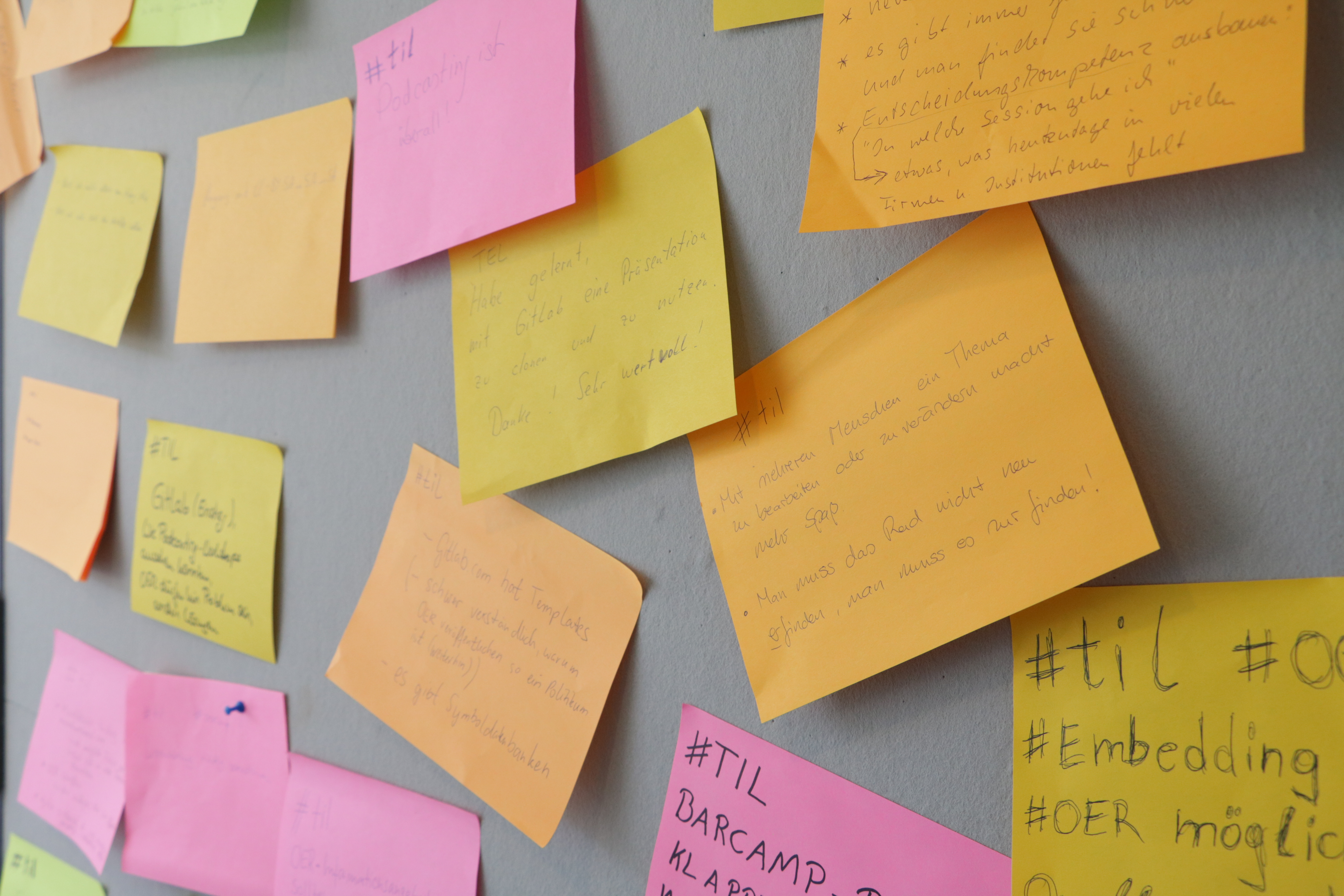 OERcamp 2019